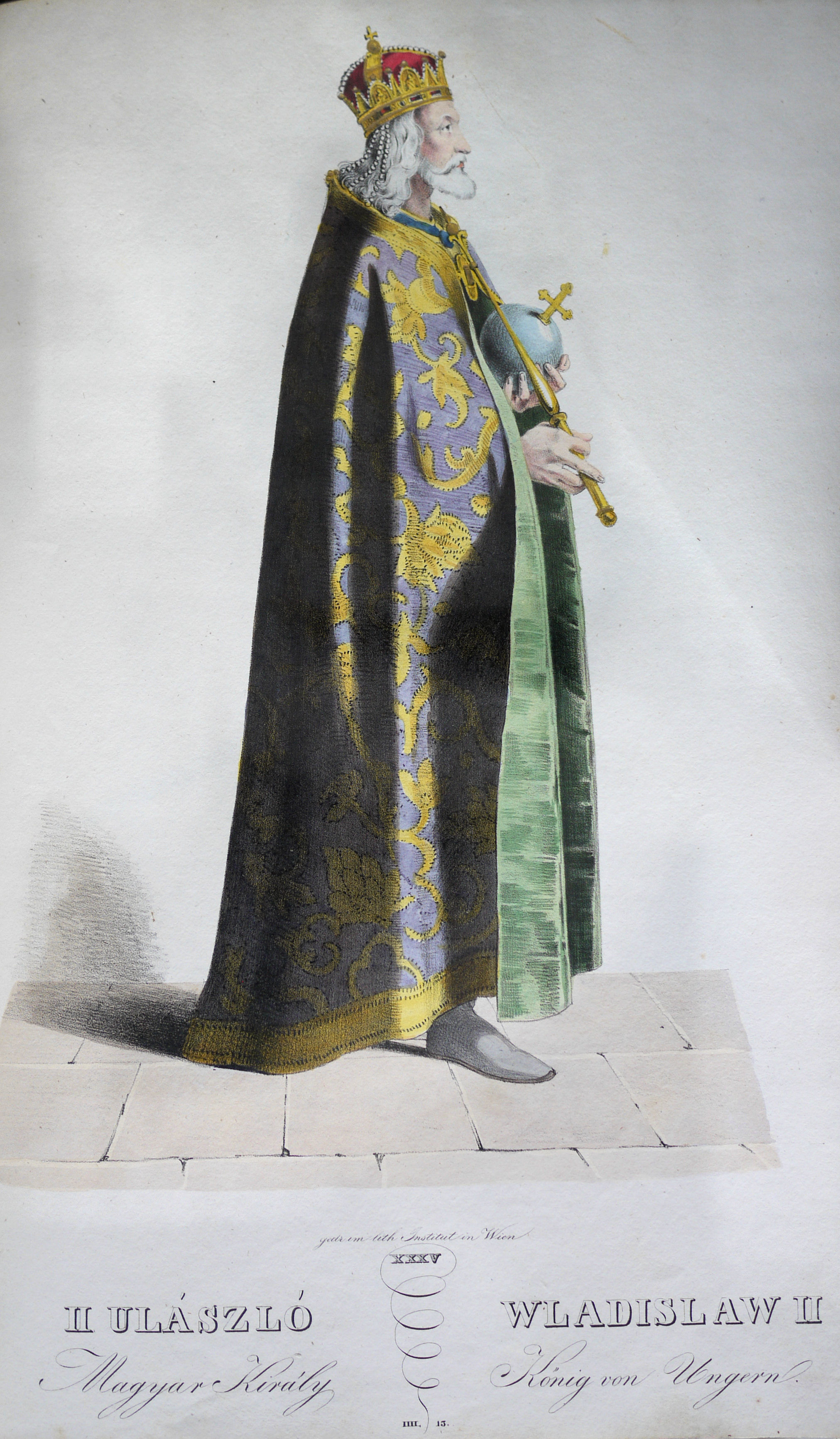 Vladislav II. (1456-1516), König von Böhmen und Ungarn etc. Lithographie von Josef Kriehuber nach einer Zeichnung von Moritz von Schwind aus Ungerns Erste Heerführer Herzoge und Koenige In einer Reihe von Bildnissen von Bela bis auf Seine Majestät Franz I. Kaiser Von Österreich König Von Ungern &c., &c. Wien : Lithographisches Institut ;ca. 1828.